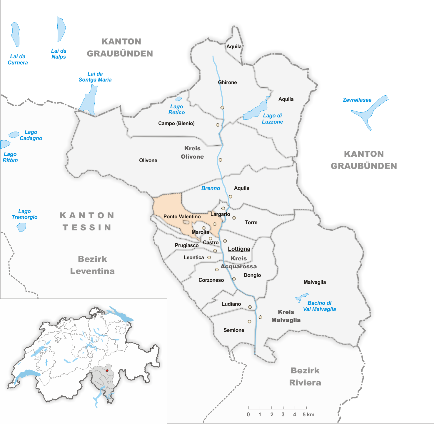 Municipality Ponto Valentino